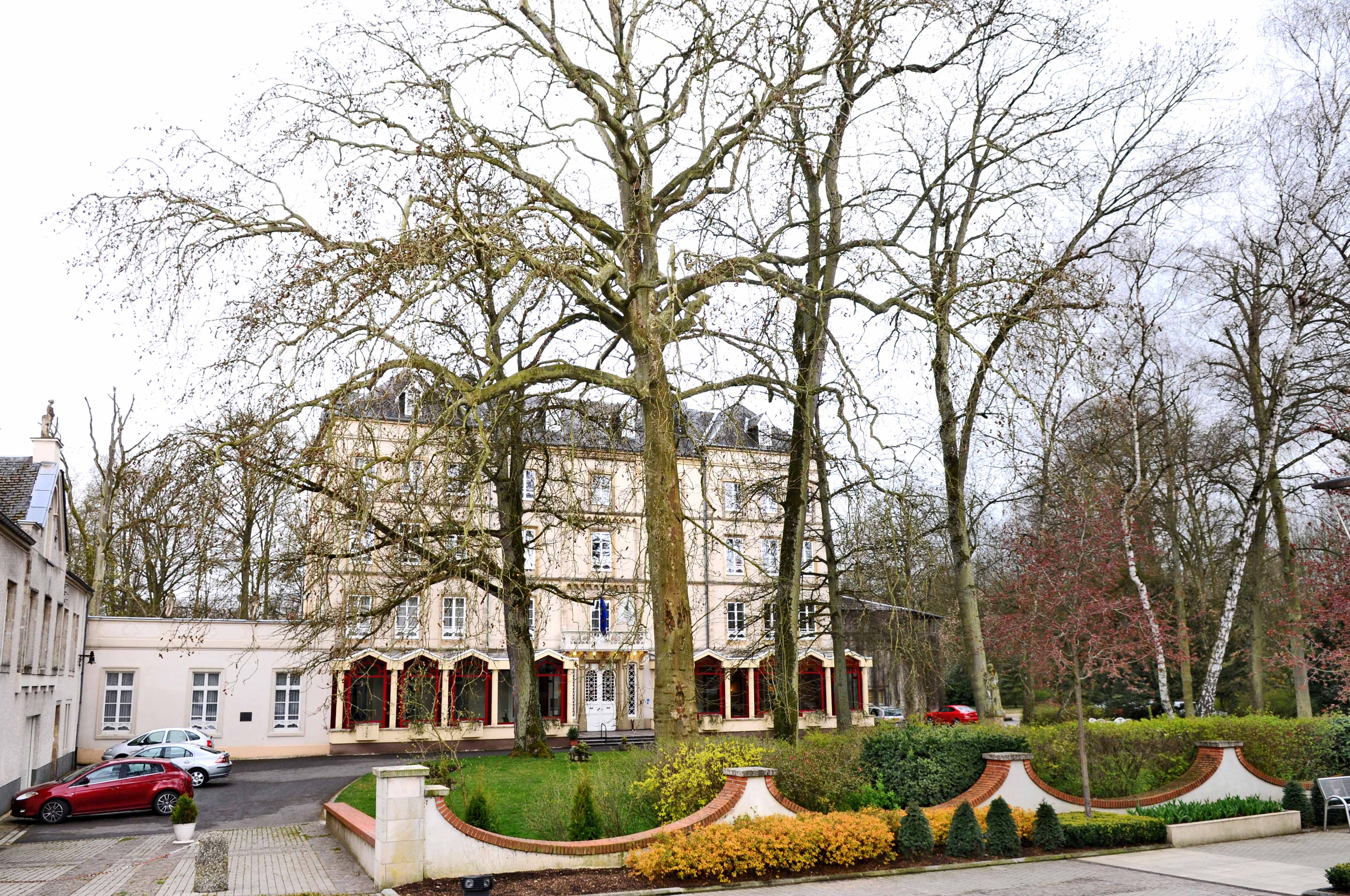 Hotel Grand-Chef zu Munneref. Kategorie:Gemeng Munneref